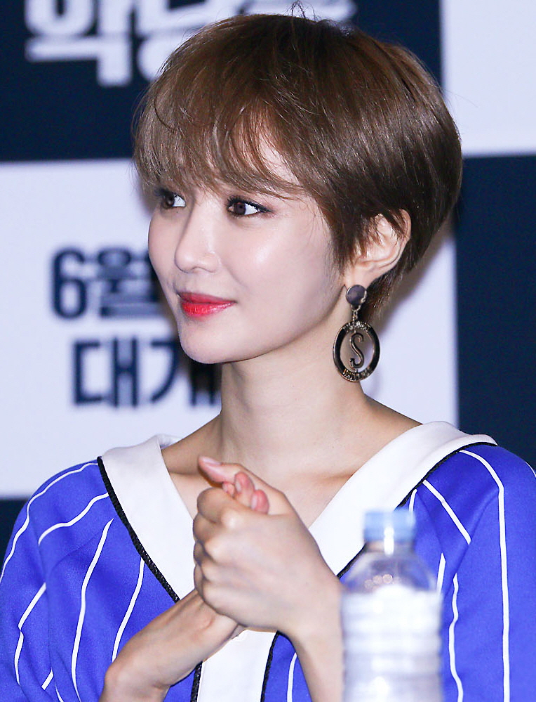 150630 고준희 메가박스 코엑스 나의절친악당들 GV